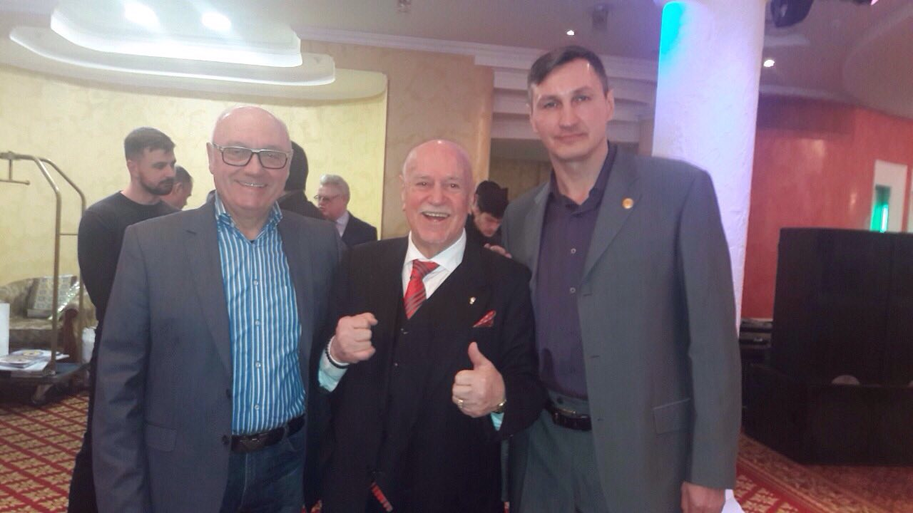 В Киеве отметили 25-летие национальной лиги профессионального бокса в Украине.